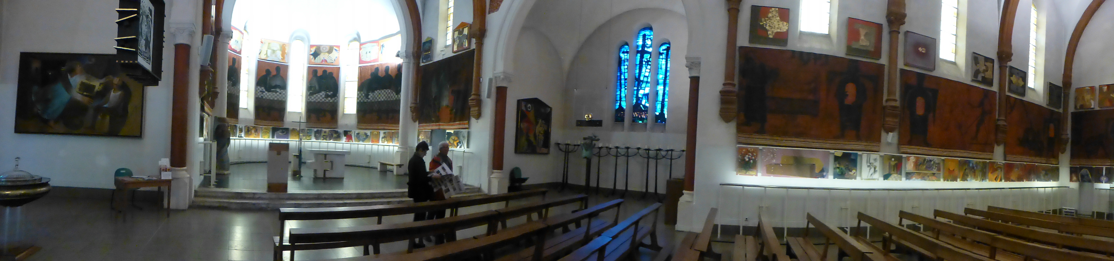 Vue panoramique 180° du Musée d'Art Sacré Contemporain de Saint-Hugues-de-Chartreuse